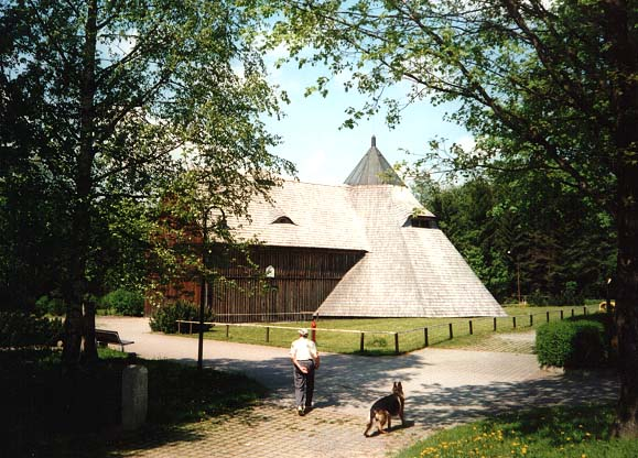 Pferdegöpel in Johanngeorgenstadt, Mai 2003